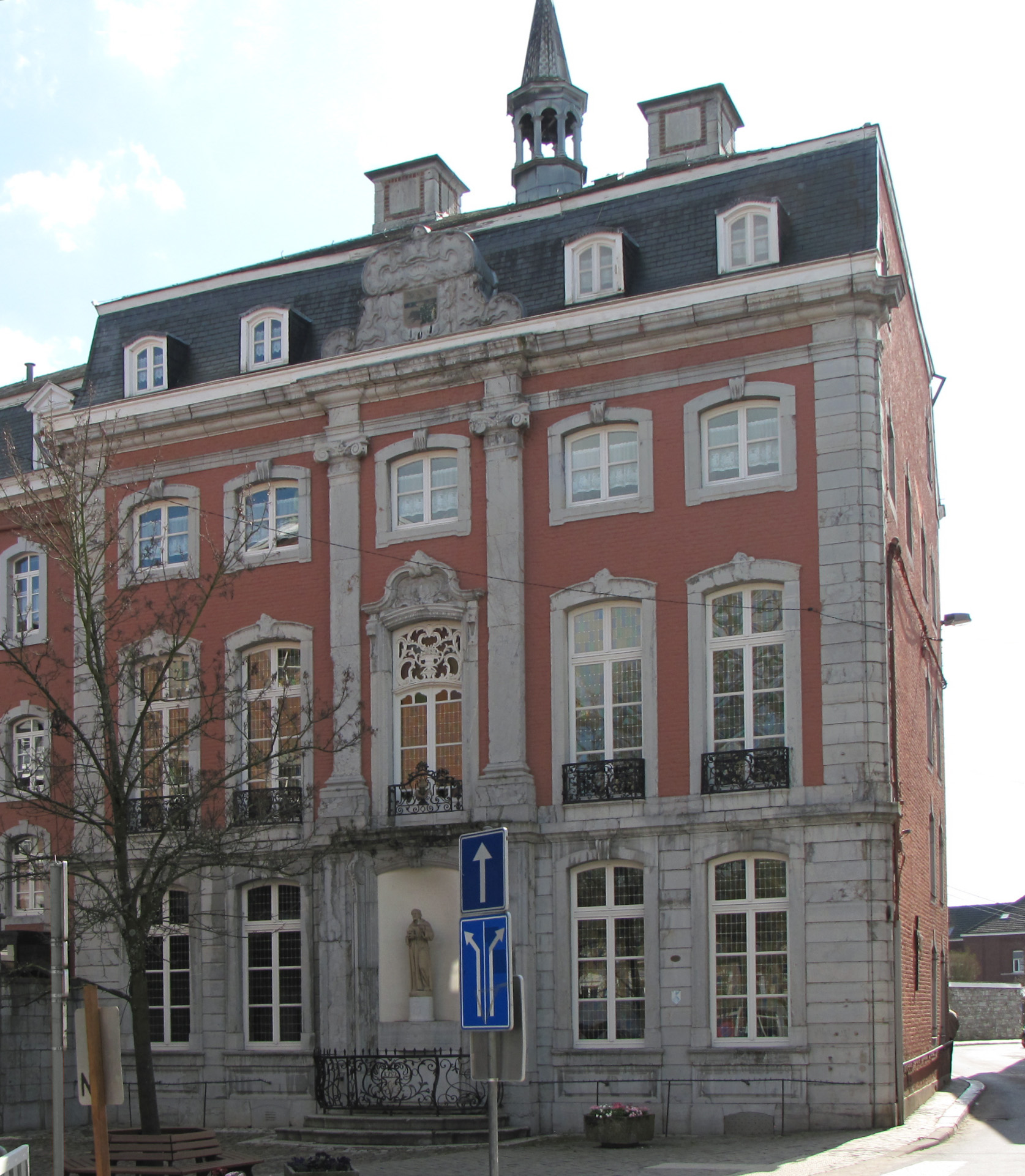 Couvent des Franciscaines Eupen